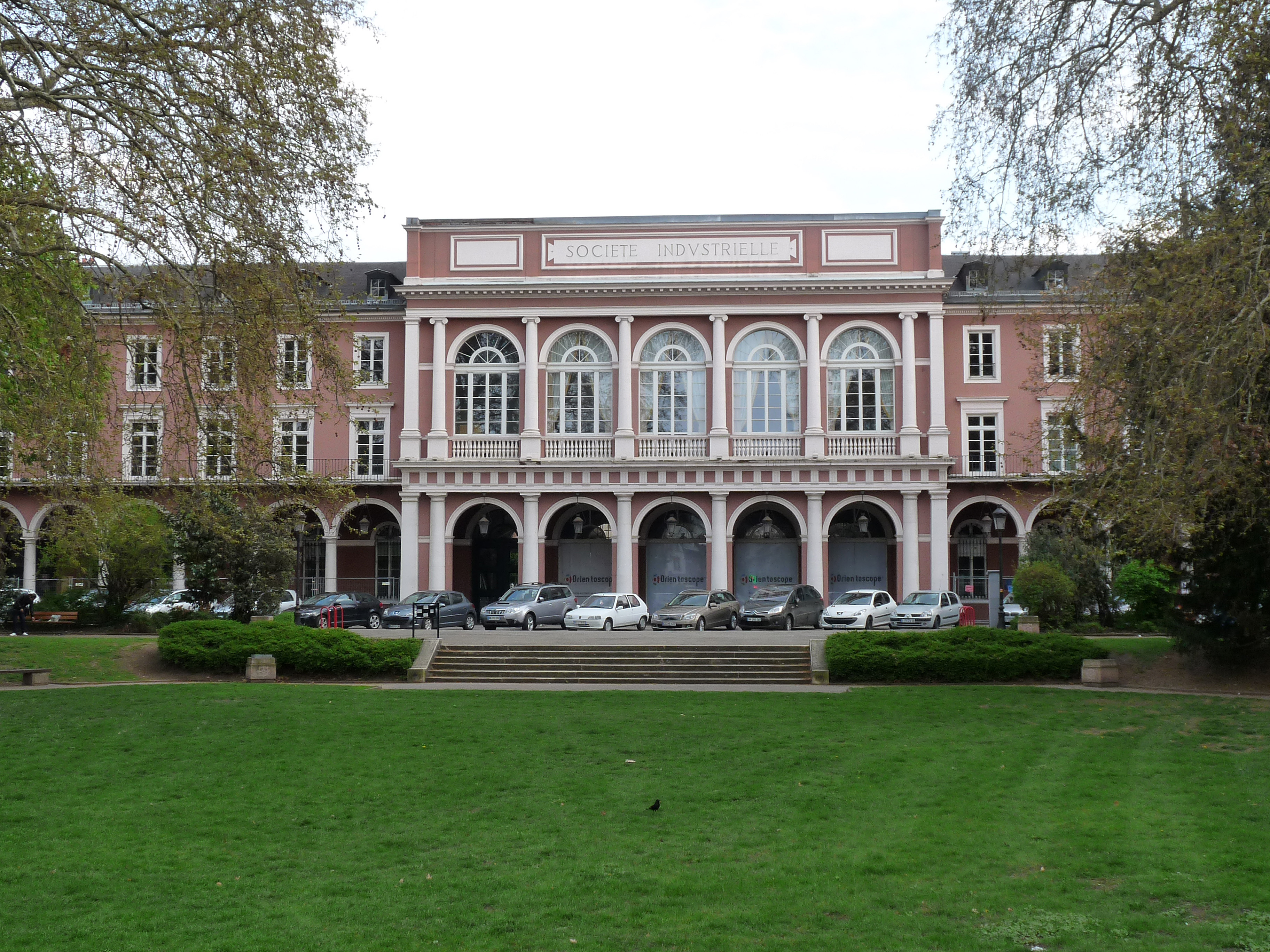 Mulhouse (Haut-Rhin) : Société industrielle de Mulhouse (SIM), place de la Bourse